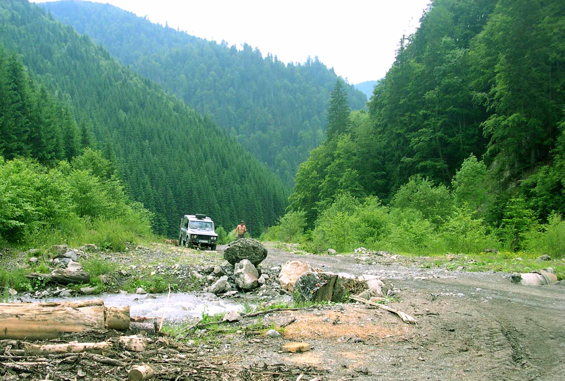 pista de Reapedea